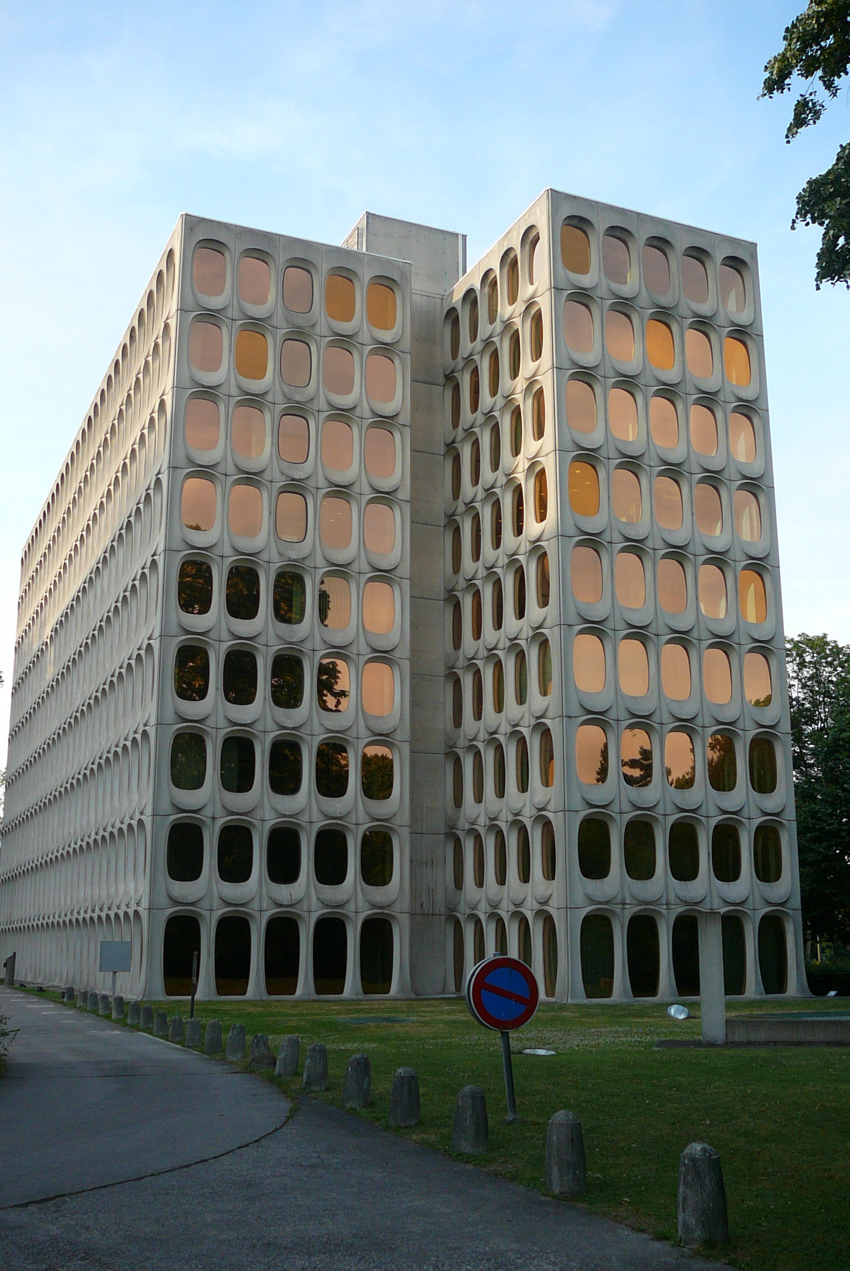 Ancien siège social des Cimenteries CBR (arrière), chaussée de La Hulpe, à Watermael-Boitsfort, en Région de Bruxelles-Capitale, Belgique. Oeuvre de Constantin Brodzki en collaboration avec Marcel Lambrichs, construit entre 1967 et 1970.